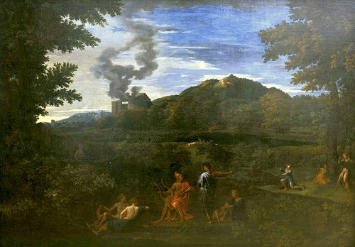 Peinture dans le style de Poussin inspirée d'autres peintures de l'artistes présentes au Louvre et au musée Condé de Chantilly. Il pourrait s'agir d'une copie d'un original de Poussin disparu. Une copie de ce tableau est conservée dans la collection du Metropolitan Museum.